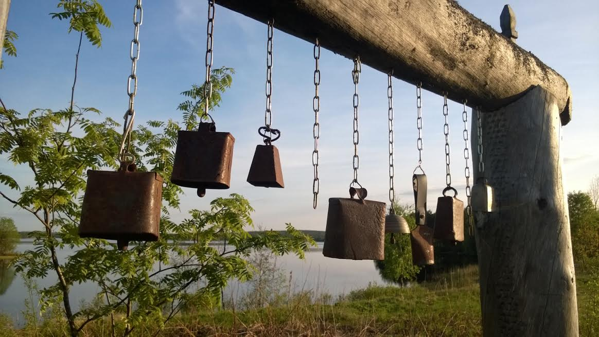 Kylän muistomerkissä joka pystytetty v. 2010 on lehmänkelloja